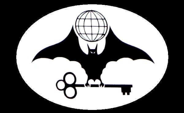 Символ муниципальных служб спасения